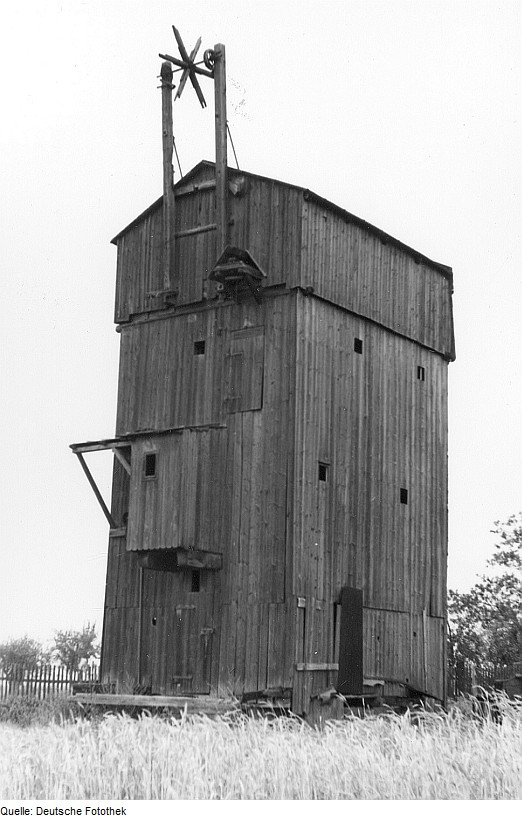 Original image description from the Deutsche Fotothek Langeln (Kreis Wernigerode). Paltrockmühle, Baujahr 1930